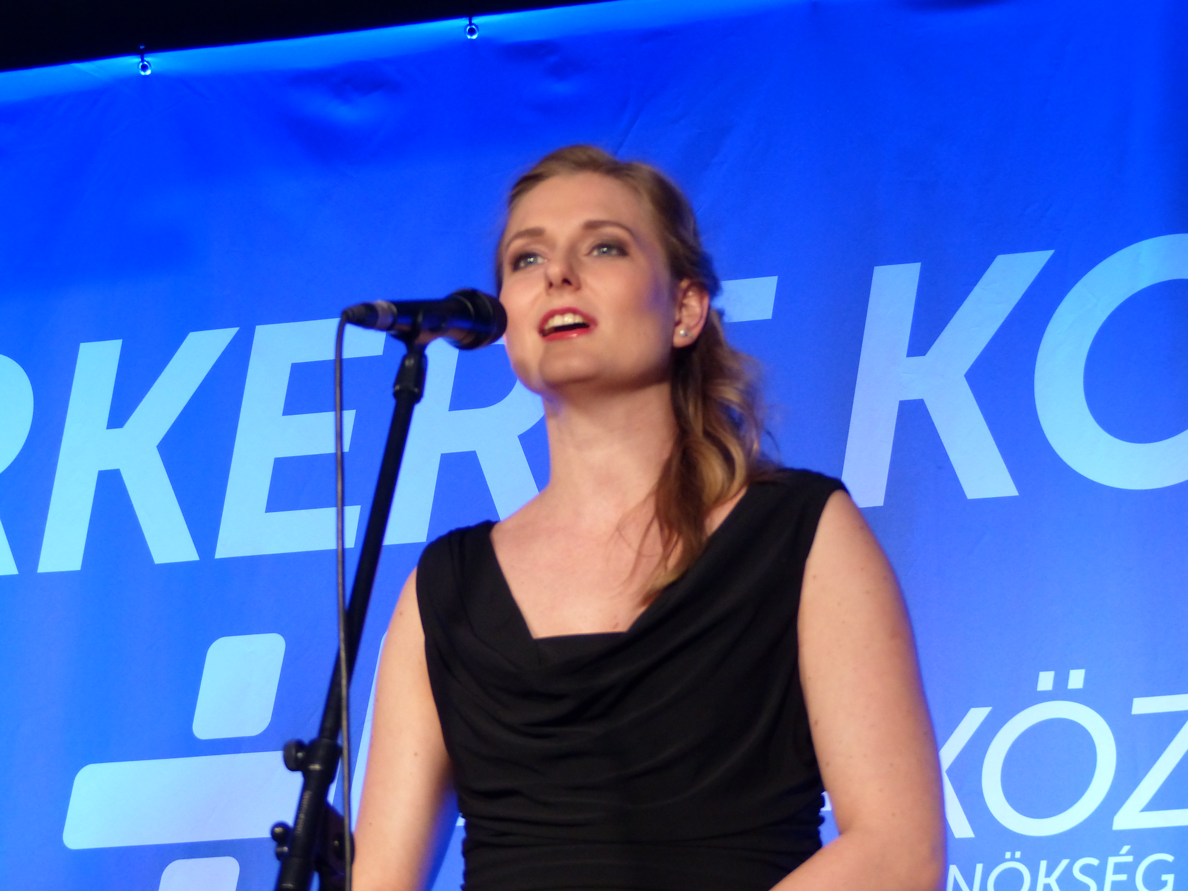 Kubinyi Júlia. Kubinyi Júlia, Kurdi Gábor, Pusko Márton trió. A felvétel 2018. április 20-án, pénteken készült a Várkert Bazárban, Budapesten.